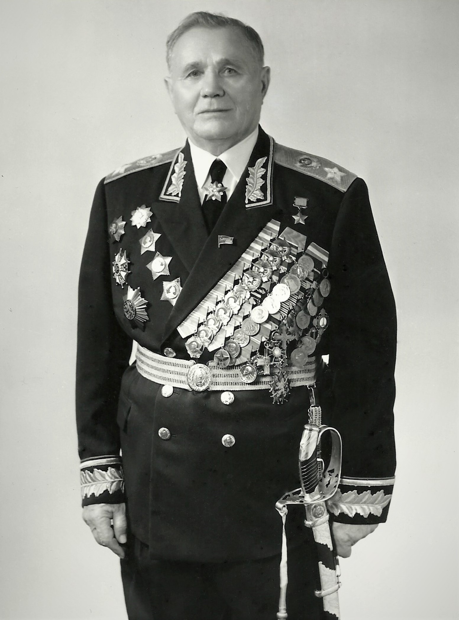 Маршал Советского Союза Герой Советского Союза Андрей Иванович Ерёменко